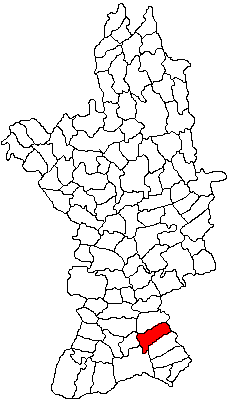 Categorie:Hărţi ale judeţului Olt